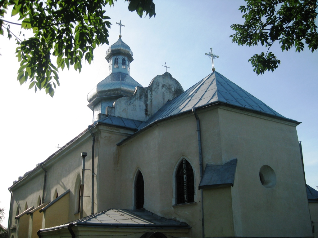 церква в селі Давидів